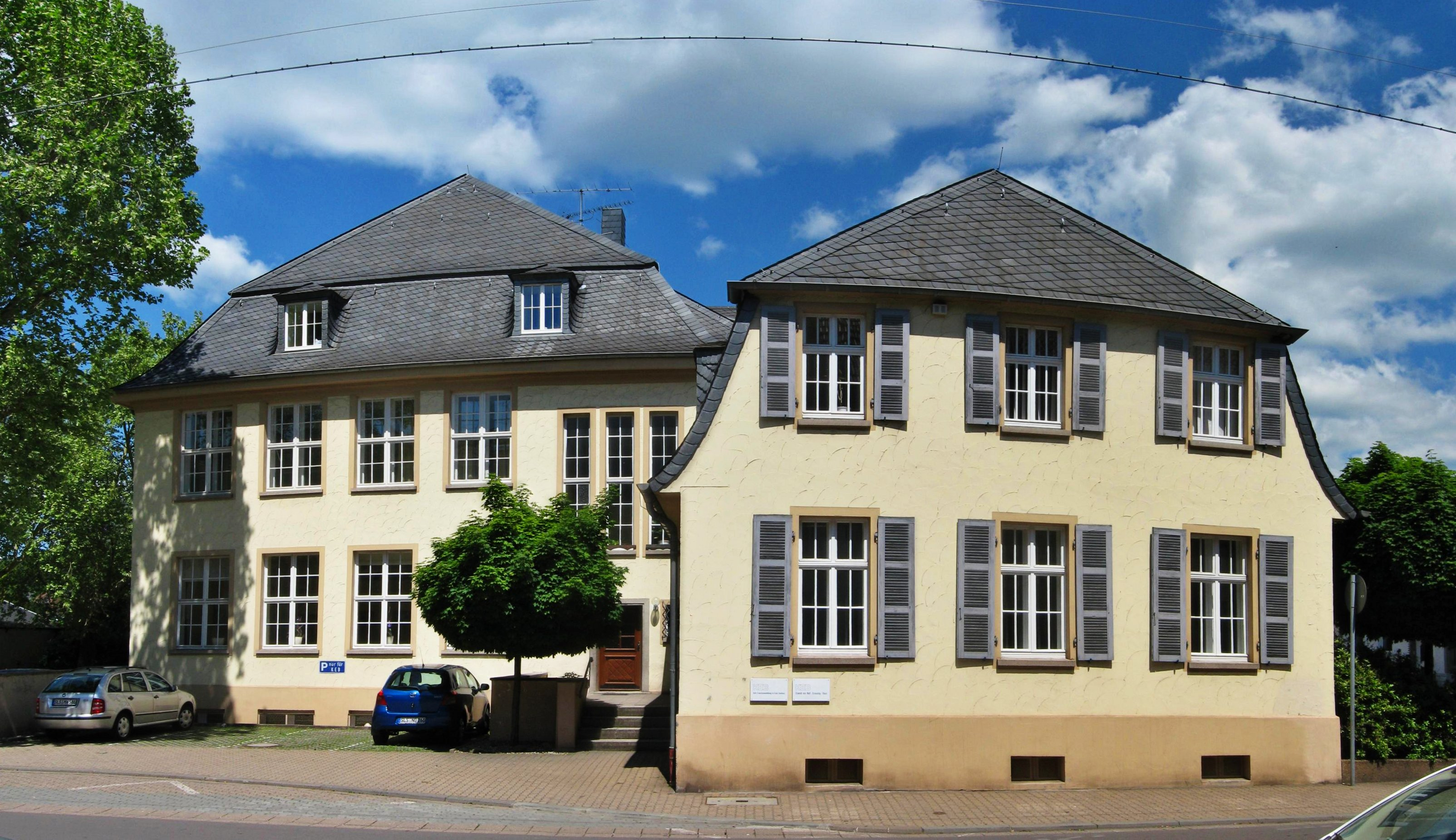 Evangelische Schule in Dillingen